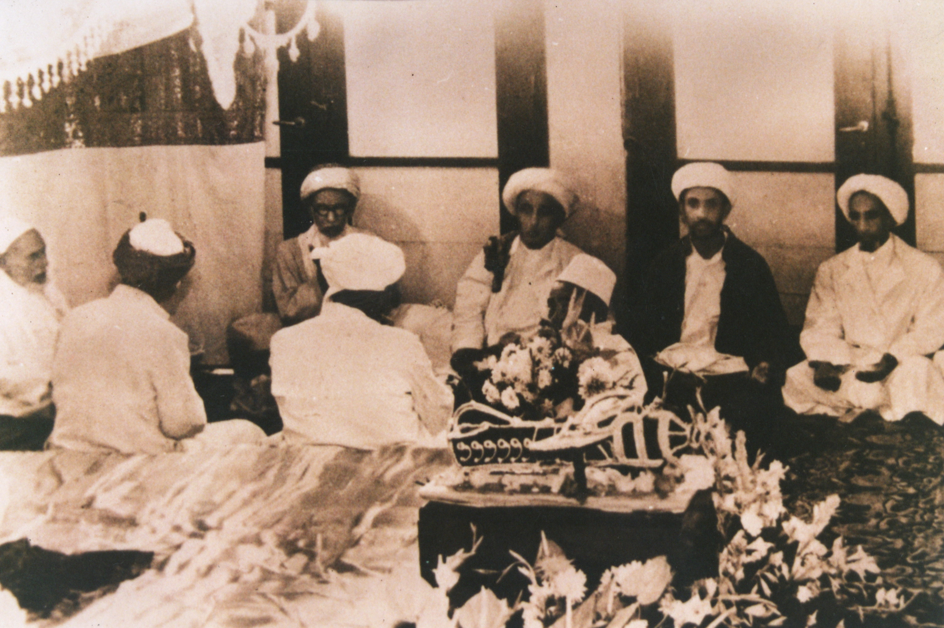 أئمة إندونسيا